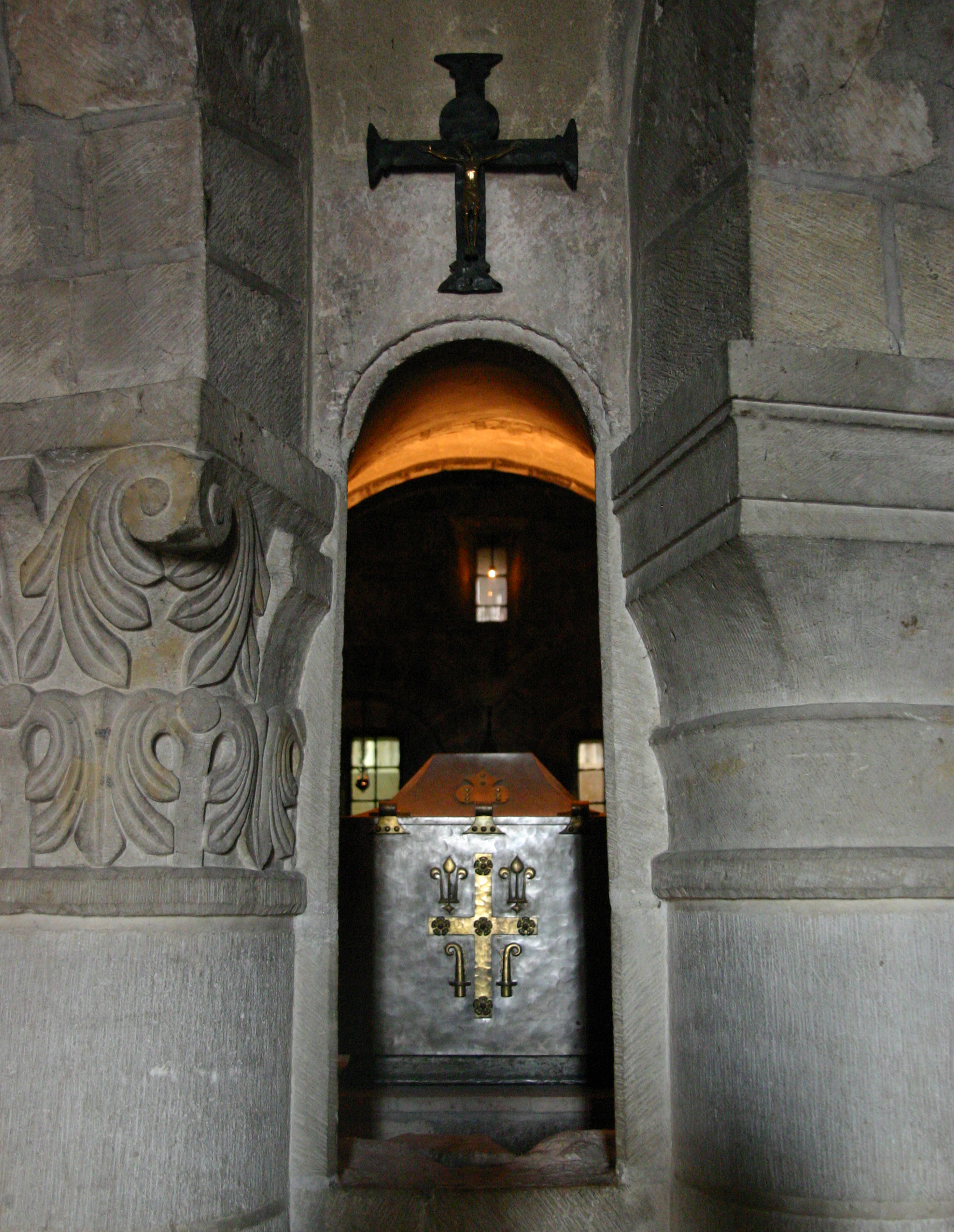 Saint-Benoît-sur-Loire